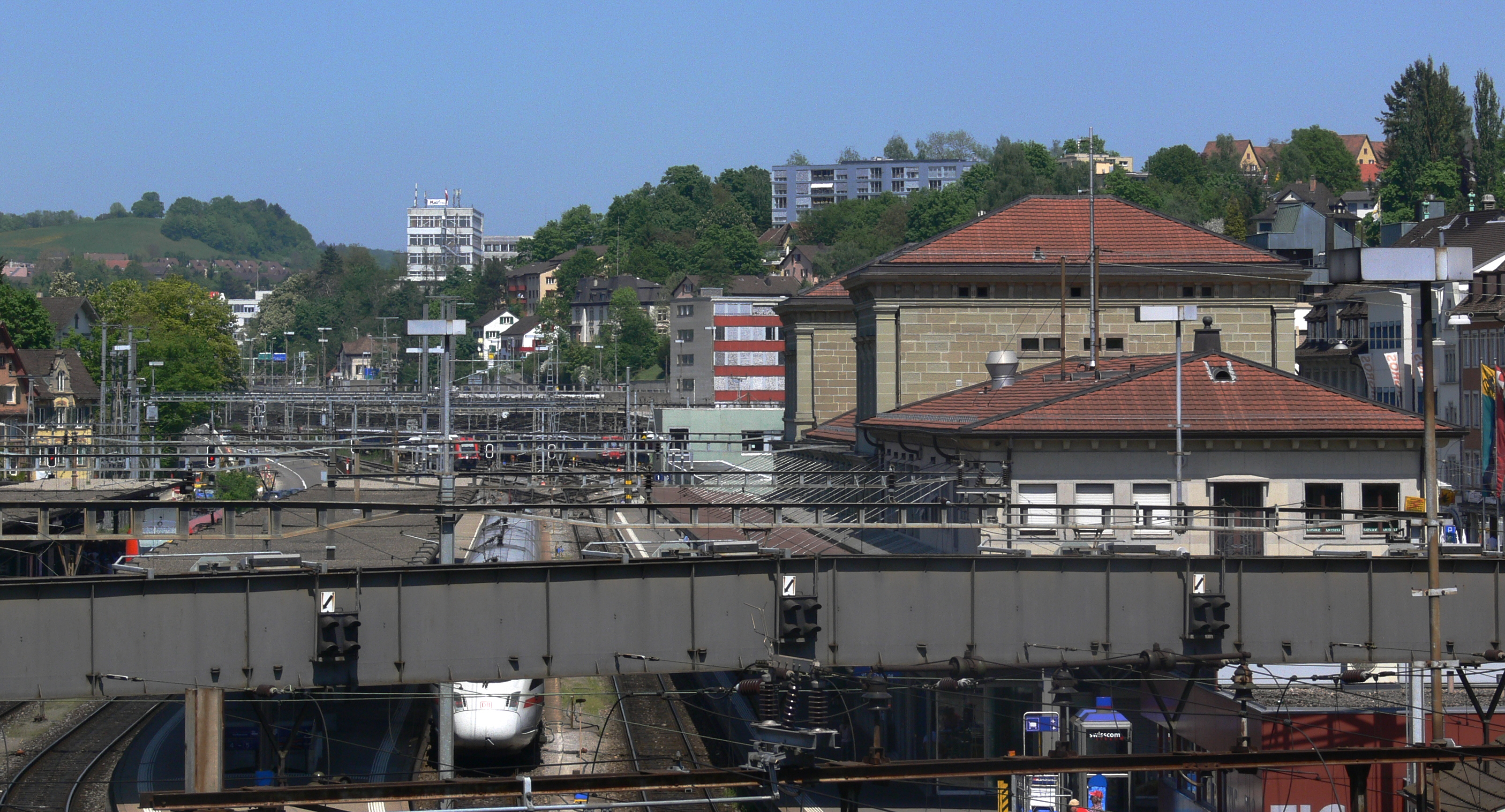 Schaffhausen, Bahnhof